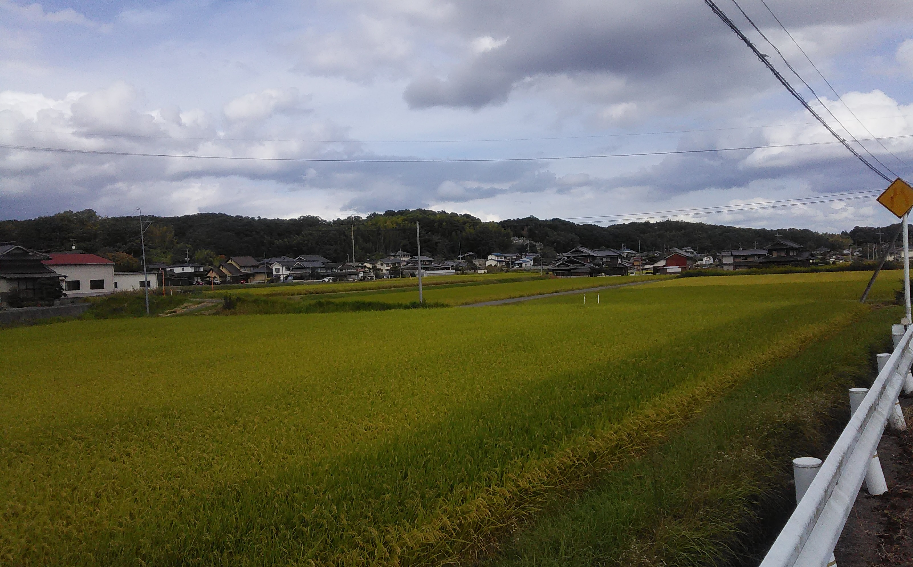 大池北畔より岡田地区を望む